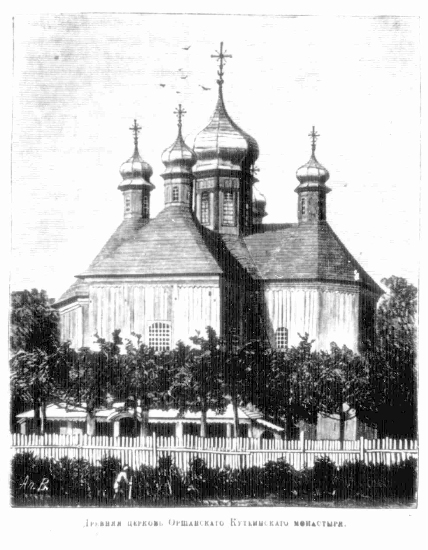 Фотоснимок 80-е годов XIX века. Годы жизни Собора 1635-1885гг.